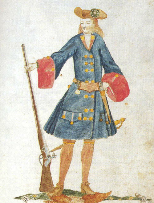 Gaspar Ferran, miliciano de la Coronela de Barcelona en la compañía de los Plateros (Argenters)